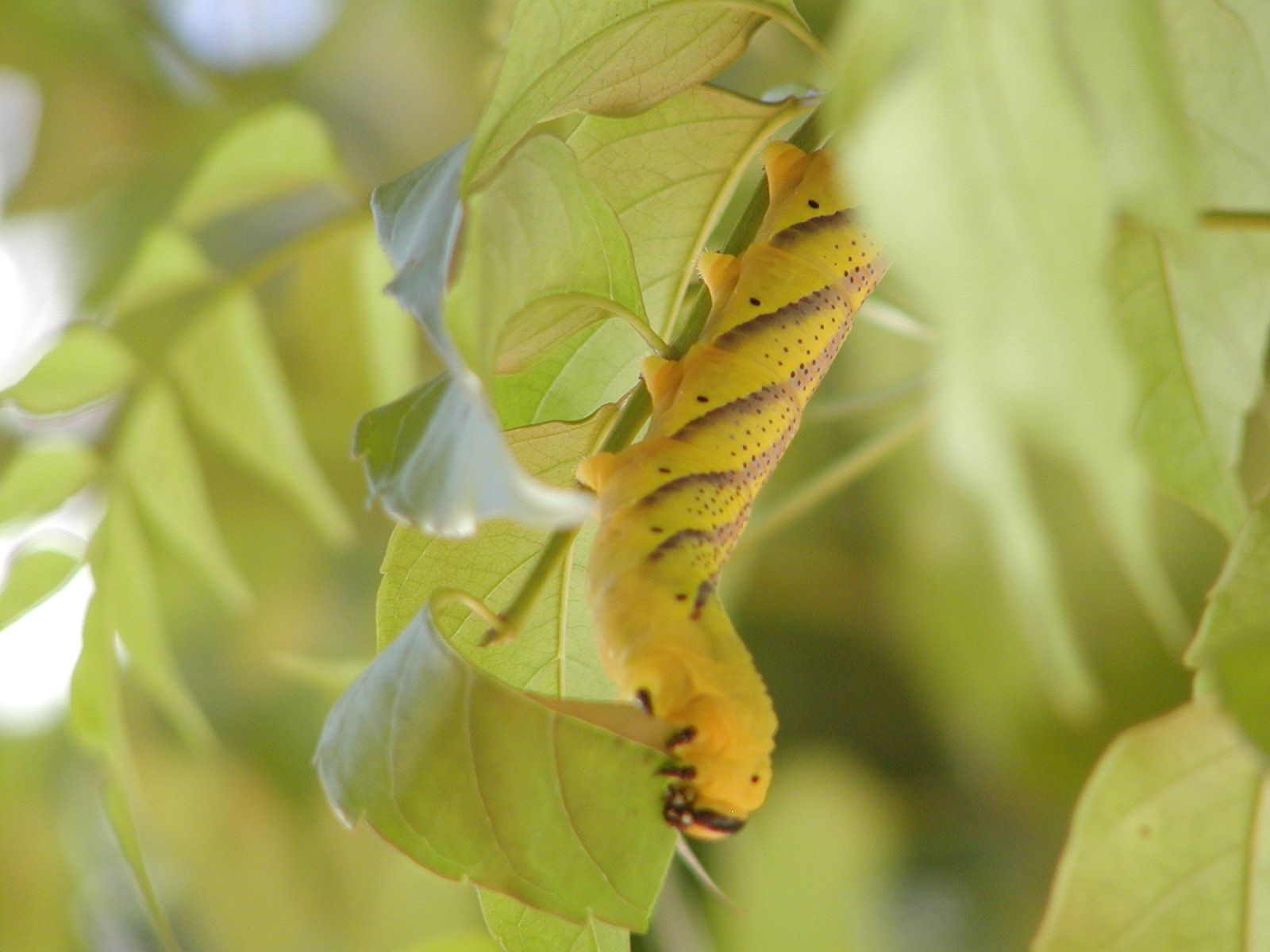 Acherontia atropos